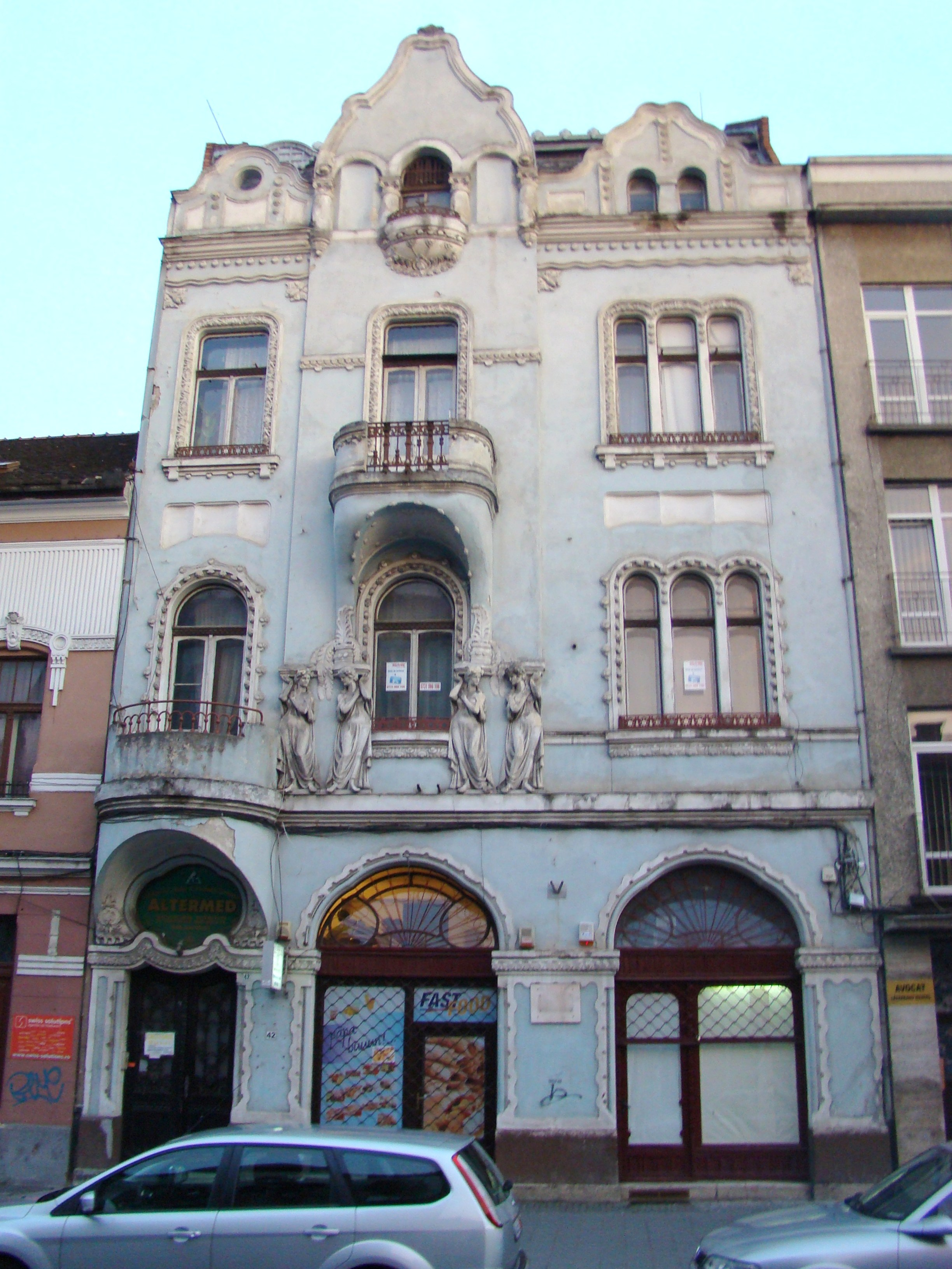 Clădire monument istoric, Bd.Eroilor, nr.42